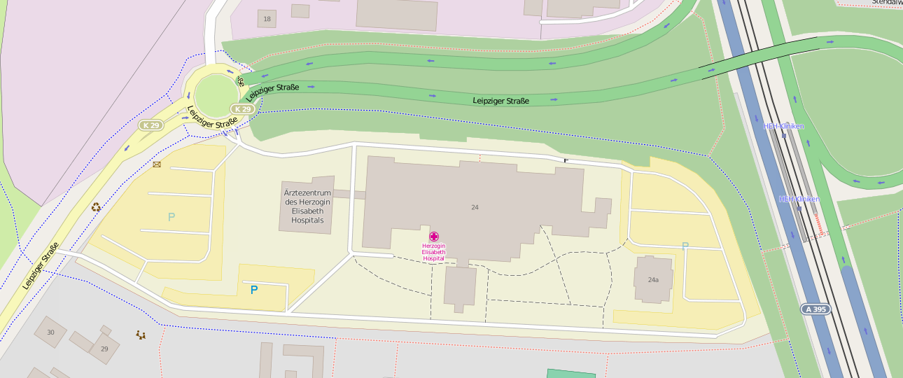 Plan des Herzogin-Elisabeth-Hospitals in Braunschweig-Melverode 2015.